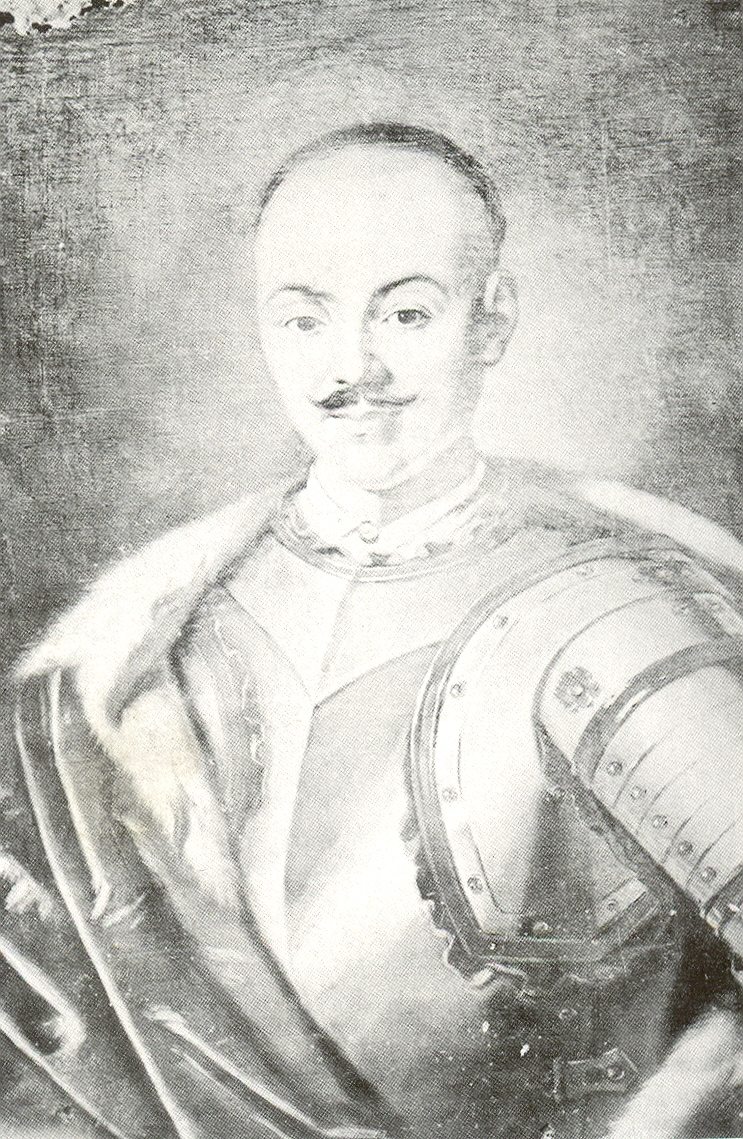 Беларуская (тарашкевіца): Партрэт Дамініка Касакоўскага (Daminik Kasakoŭski)